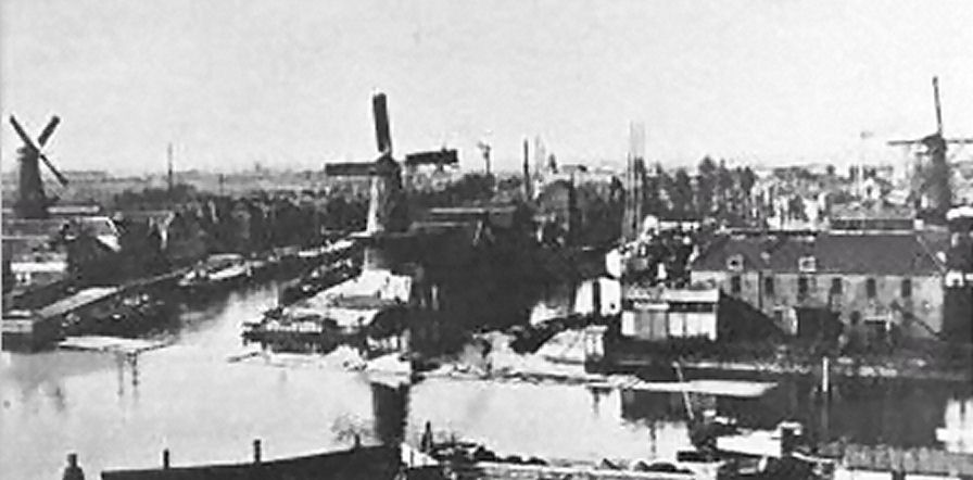 Molen links: het Vertrouwen, molen in het midden: de Distilleerketel in Delfshaven, Zuid-Holland, the Netherlands